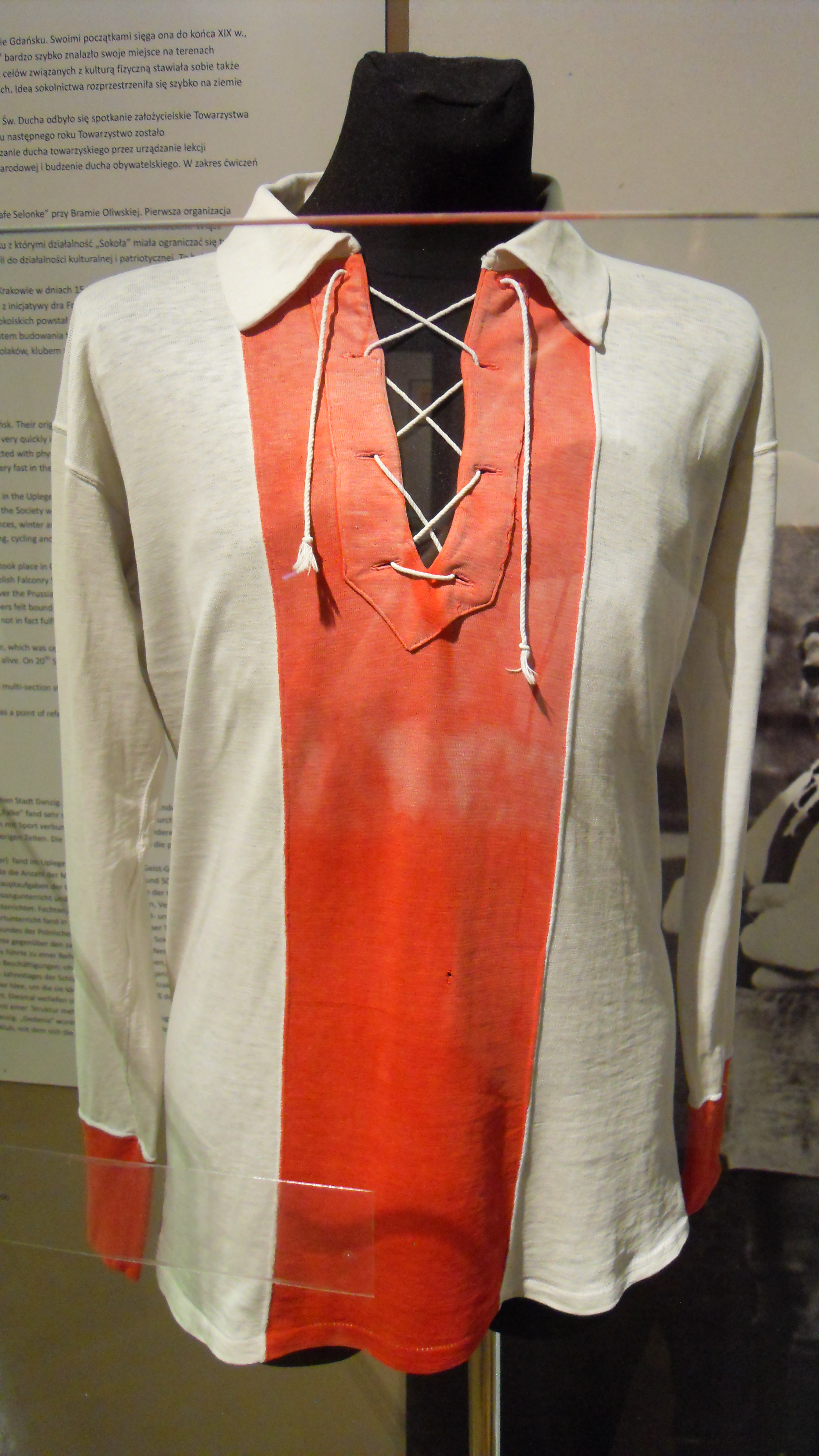 Muzeum Poczty Polskiej w Gdańsku. "Gedania", koszulka Franciszka Jankowskiego.